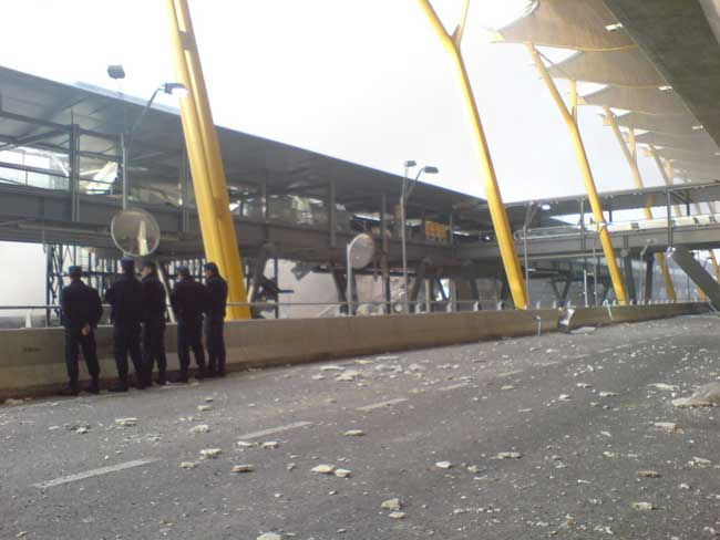 Custodia policial.